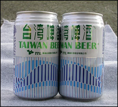 臺灣菸酒公司台灣啤酒鋁罐。